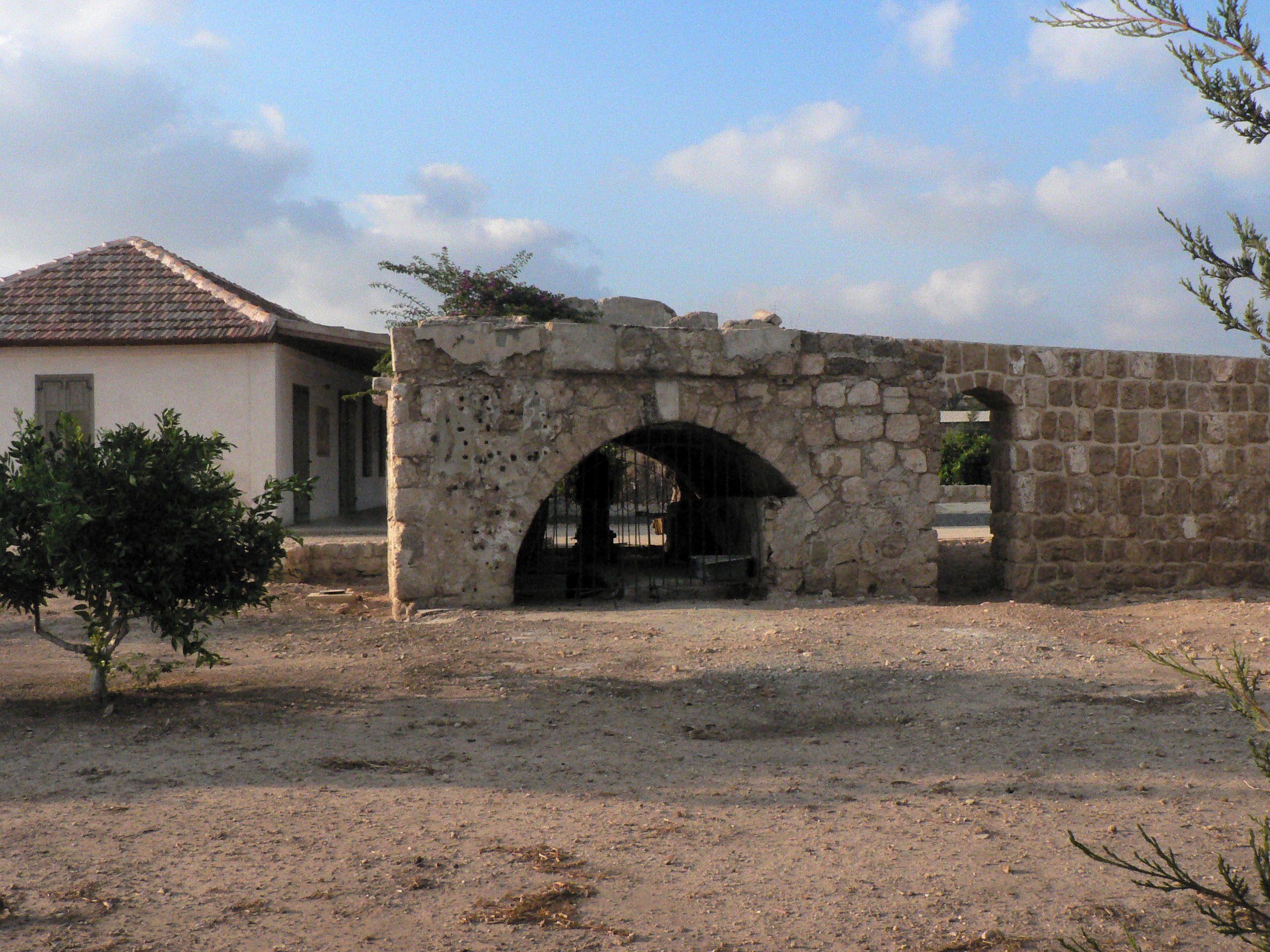 Ness Ziona נס ציונה Lerer Mansion בית לרר